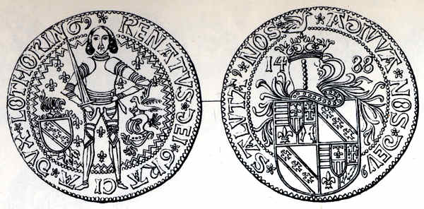 Lorraine, Ecu d'argent de René II, DS XIII-1